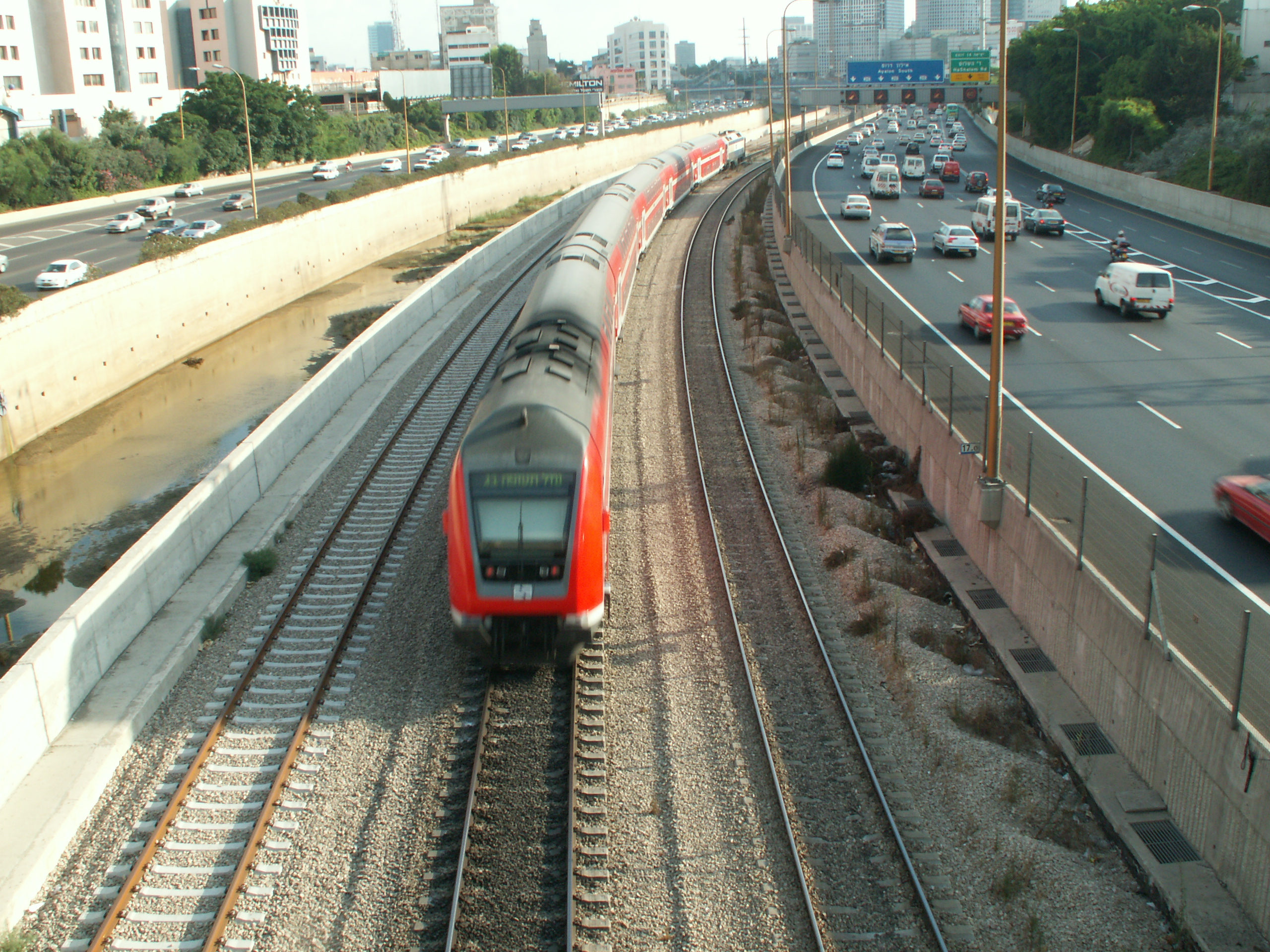 פסי רכבת בנתיבי איילון.